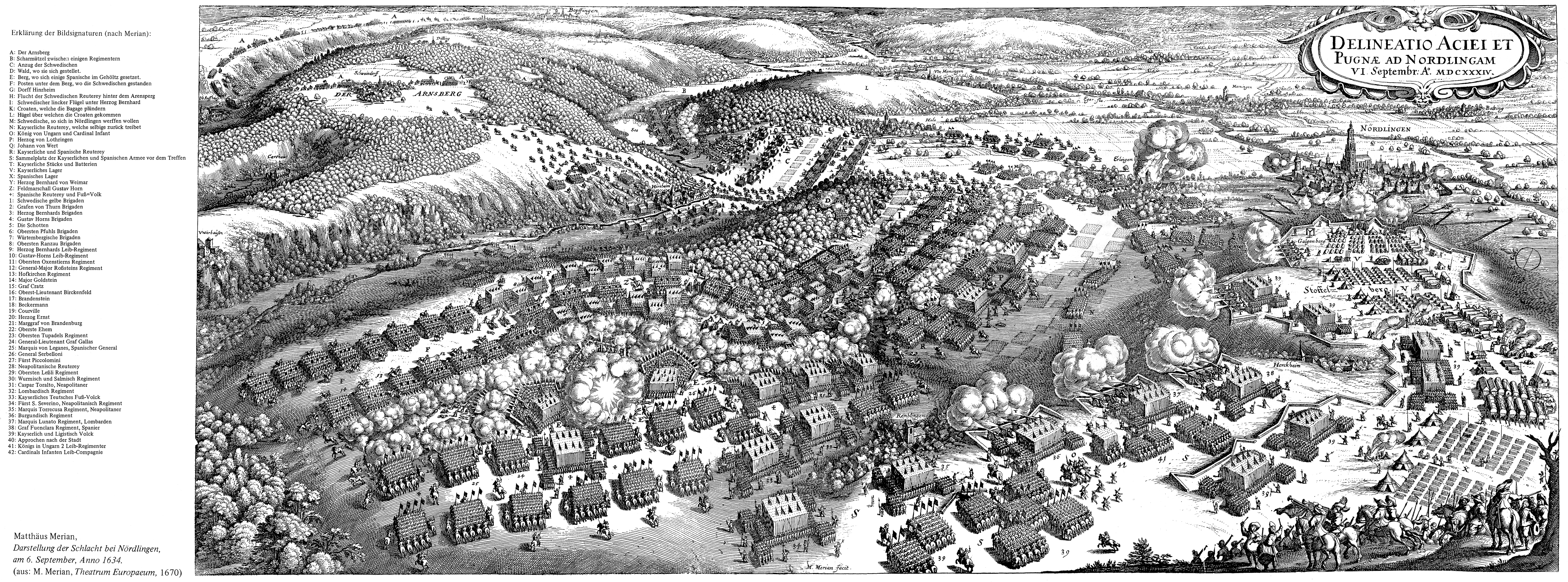 Darstellung der Schlacht bei Nördlingen auf dem Albuch, am 6. September, Anno 1634